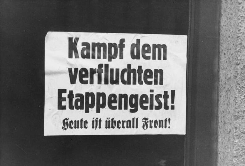 Breslau, Plakat mit Durchhalteparole ADN-Zentralbild/ Archiv II. Weltkrieg 1939-45 Die Stadt Breslau wird zur Festung erklärt. Am 16.2.1945 ist sie von den sowjetischen Truppen vollkommen eingeschlossen. Der Gauleiter und Oberpräsident Karl Hanke verlangt die Verteidigung der Stadt "bis zum letzten Mann". UBz: ein Plakat aus den ersten Februartagen. 253-45 [Breslau.- Plakat mit Durchhalteparole "Kampf dem verfluchten Etappengeist! Heute ist überall Front"] [Бреслау - Плакат: "Борись с проклятым тыловым духом! Сегодня фронт повсюду"]